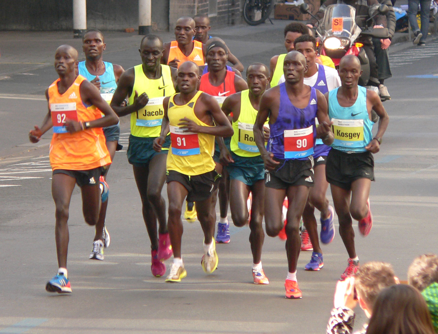 Spitzengruppe beim Hannover Marathon